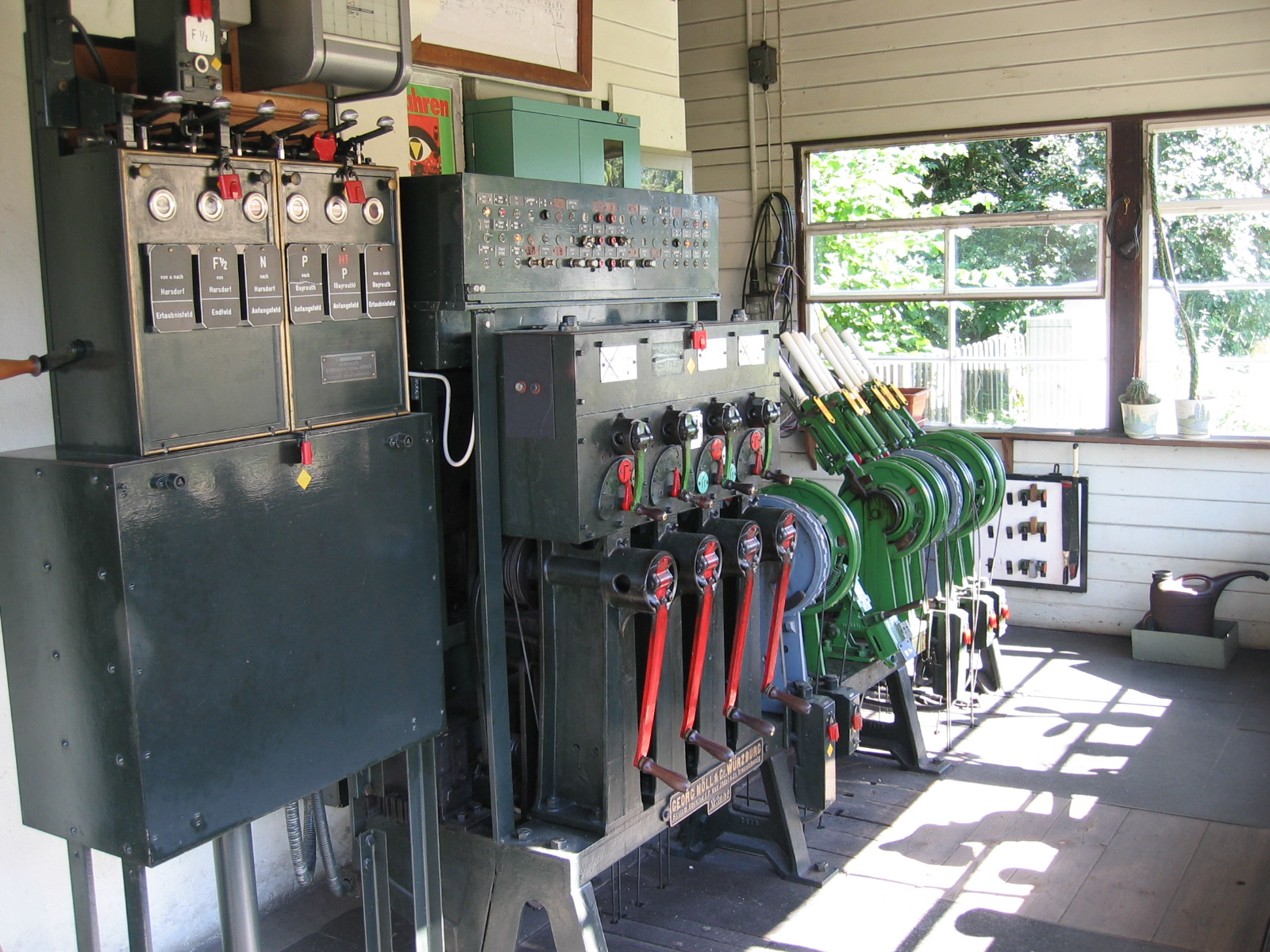 Gesamtansicht des Stellwerks im Bahnhof Bindlach